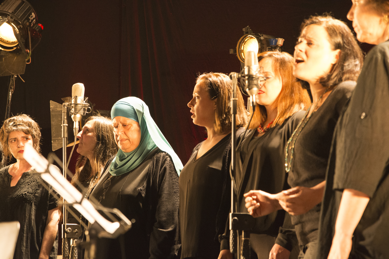 מקהלת הנשים היהודית-ערבית שיראנא מופיעה בטקס שהתקיים ב-2016 עם השיר "חד גדיא" מאת חווה אלברשטיין